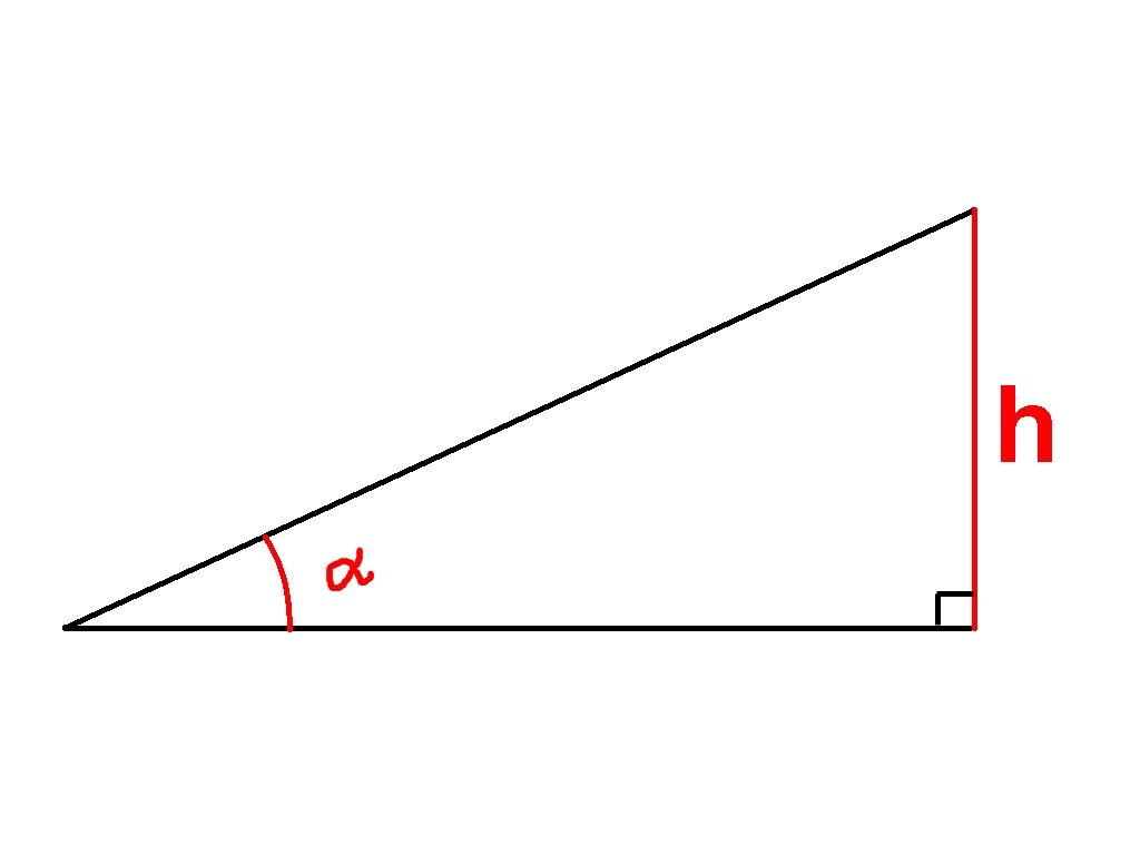 Высота прямоугольного треугольника, тангенс угла, уклон поверхности.